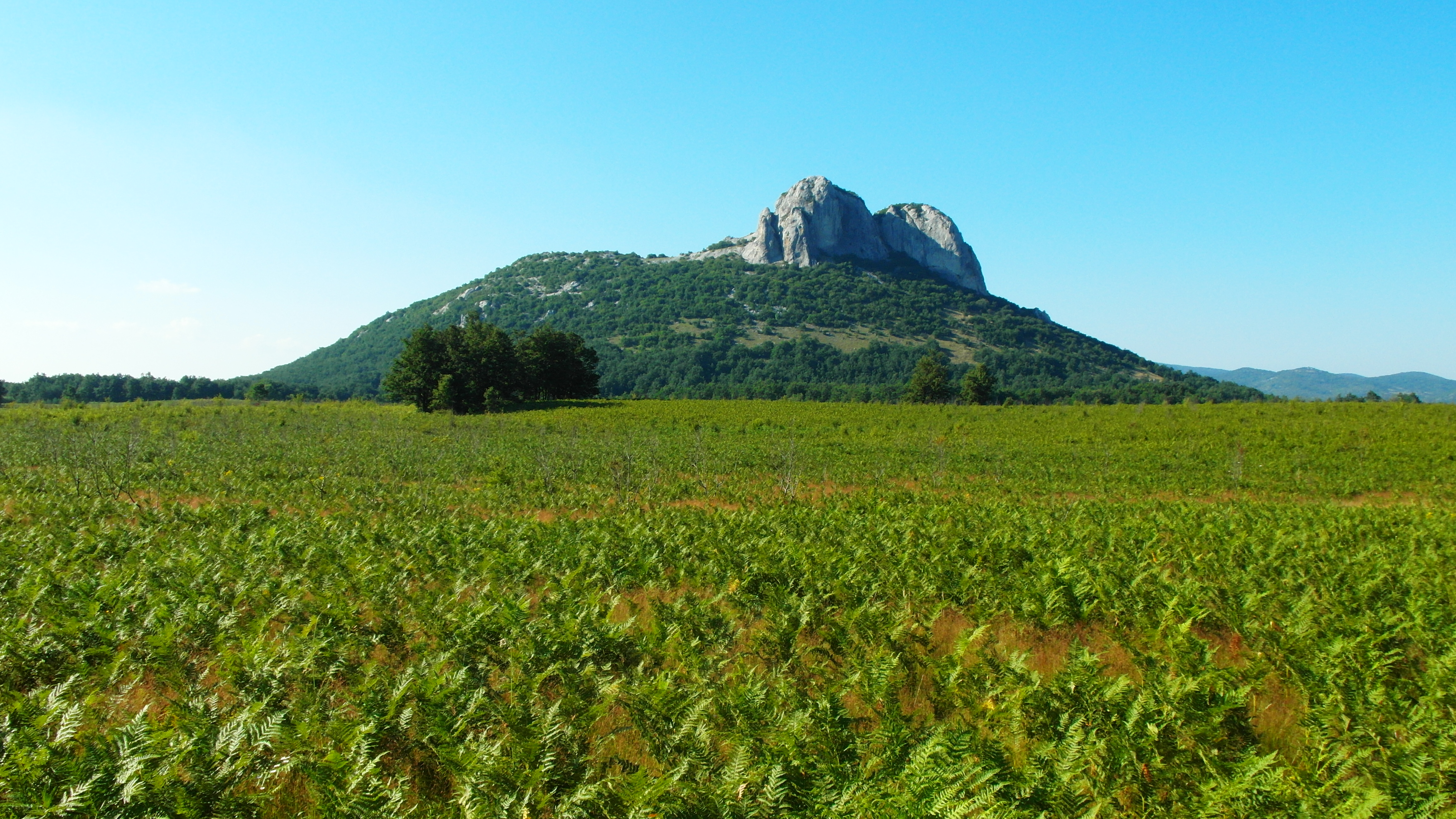 KOPEC ZIR - HILL ZIR